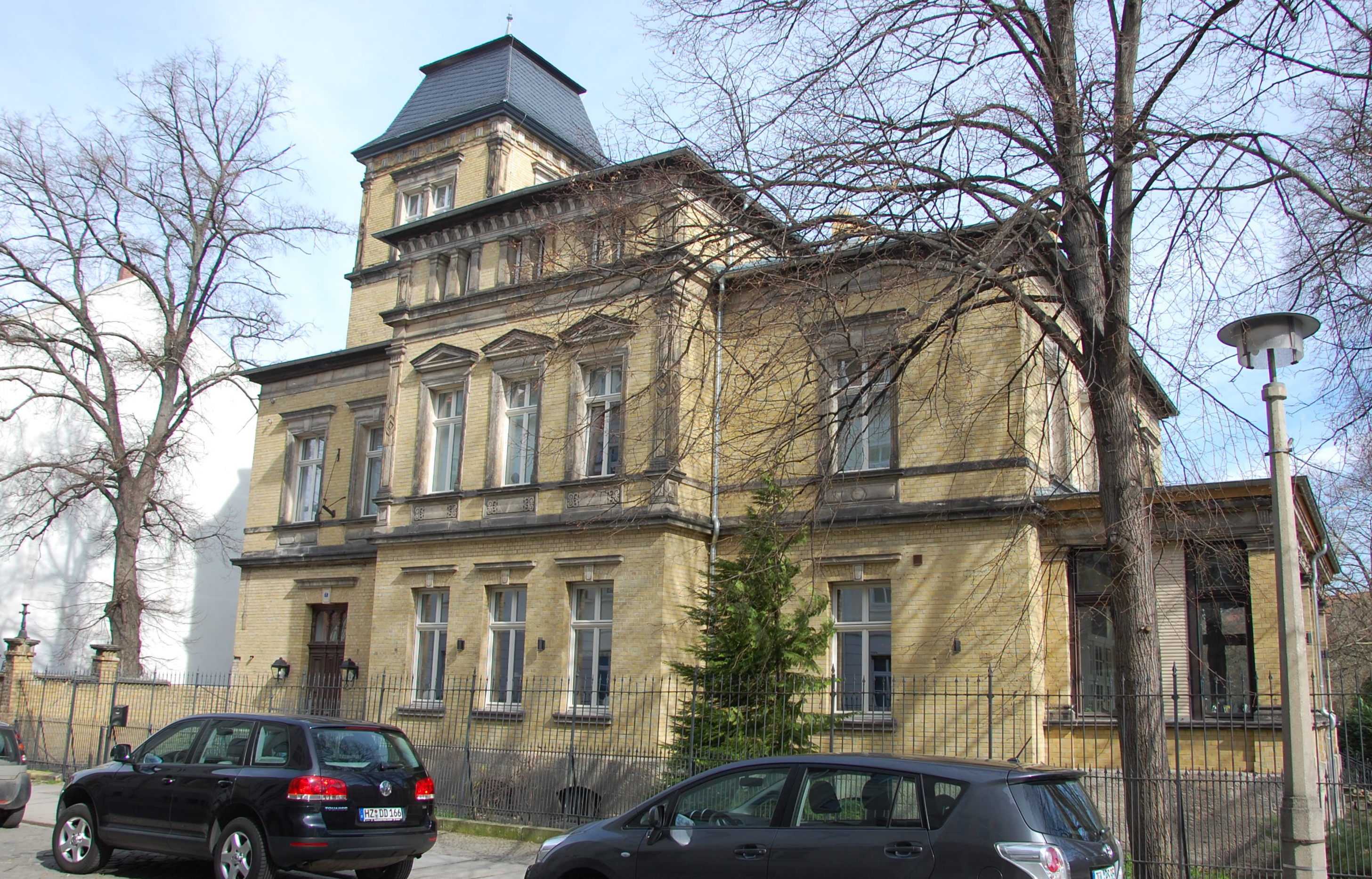 Haus Mummental 1a in Quedlinburg